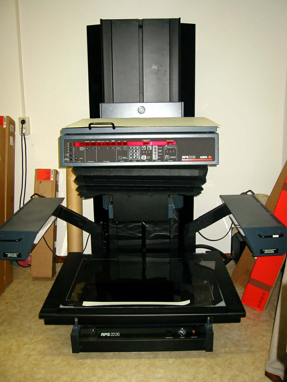 Reprokamera